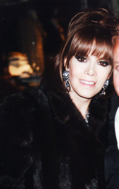 Premios GLAAD 2009 Ciudad de México